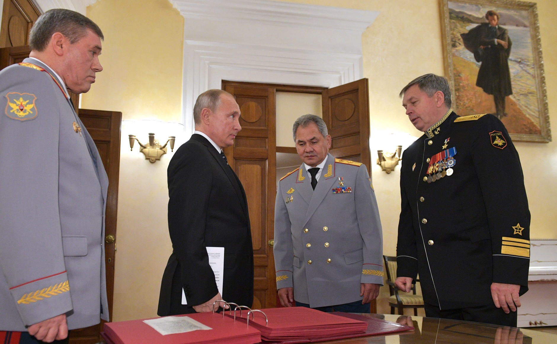 Президент Российской Федерации – Верховный Главнокомандующий Вооруженными Силами Российской Федерации Владимир Путин с начальником Генерального штаба Вооружённых Сил – первым заместителем Министра обороны Валерием Герасимовым (слева), Министром обороны Сергеем Шойгу и первым заместителем начальника ГУ Генштаба ВС РФ, вице-адмиралом Игорем Костюковым (справа) перед началом торжественного мероприятия, посвящённого 100-летию образования Главного управления Генерального штаба Вооружённых Сил России